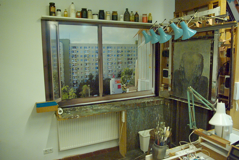 Odtworzone w Galerii Beksińskiego w Sanoku miejsce pracy Zdzisława Beksińskiego, pierwotnie w bloku przy ulicy Sonaty w Warszawie